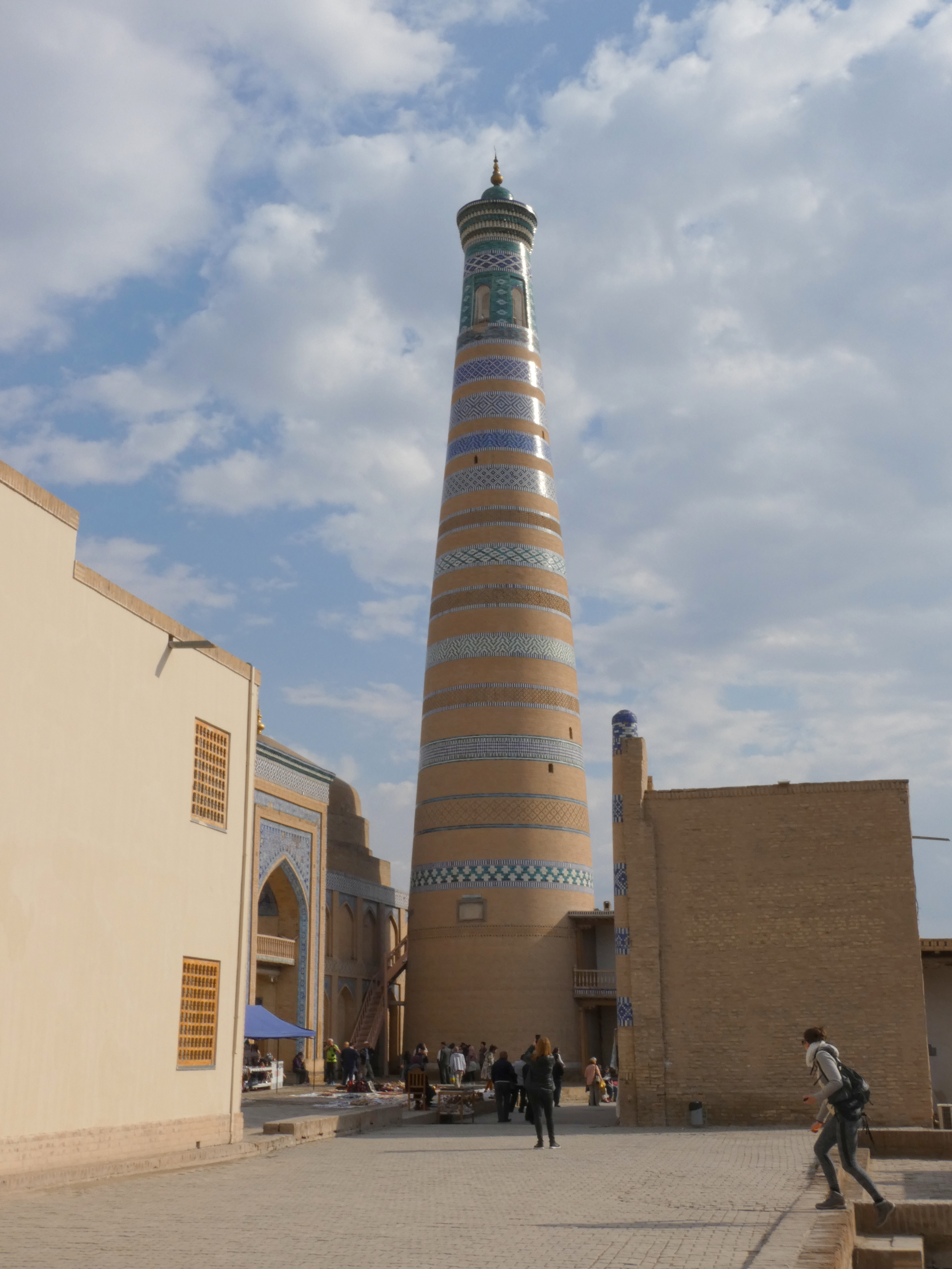 Minarett Islam Khodja, Chiwa